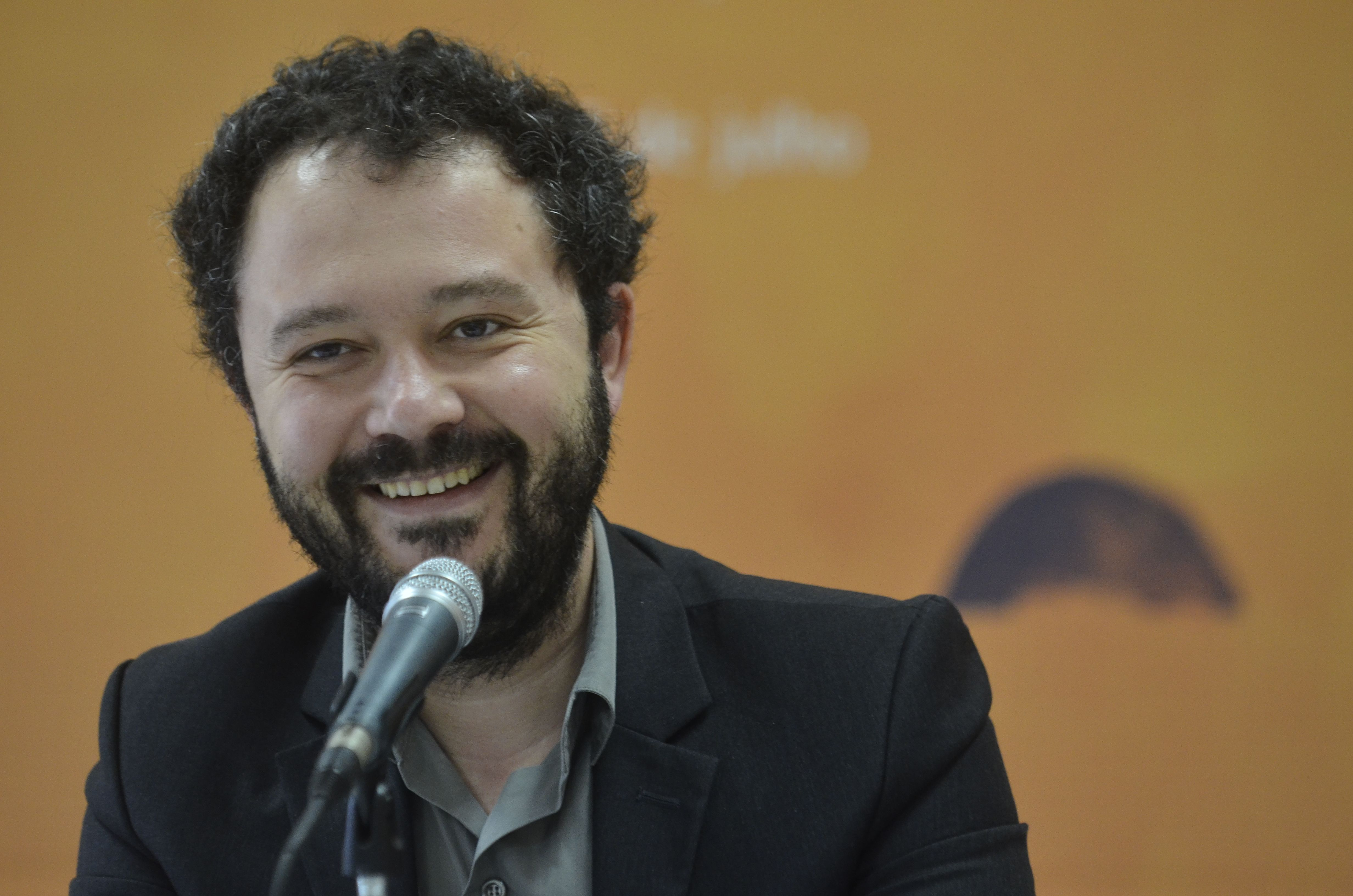 Entrevista coletiva com o cartunista francês Riad Sattouf na ocasião do lan lançamento do livro O árabe do futuro.